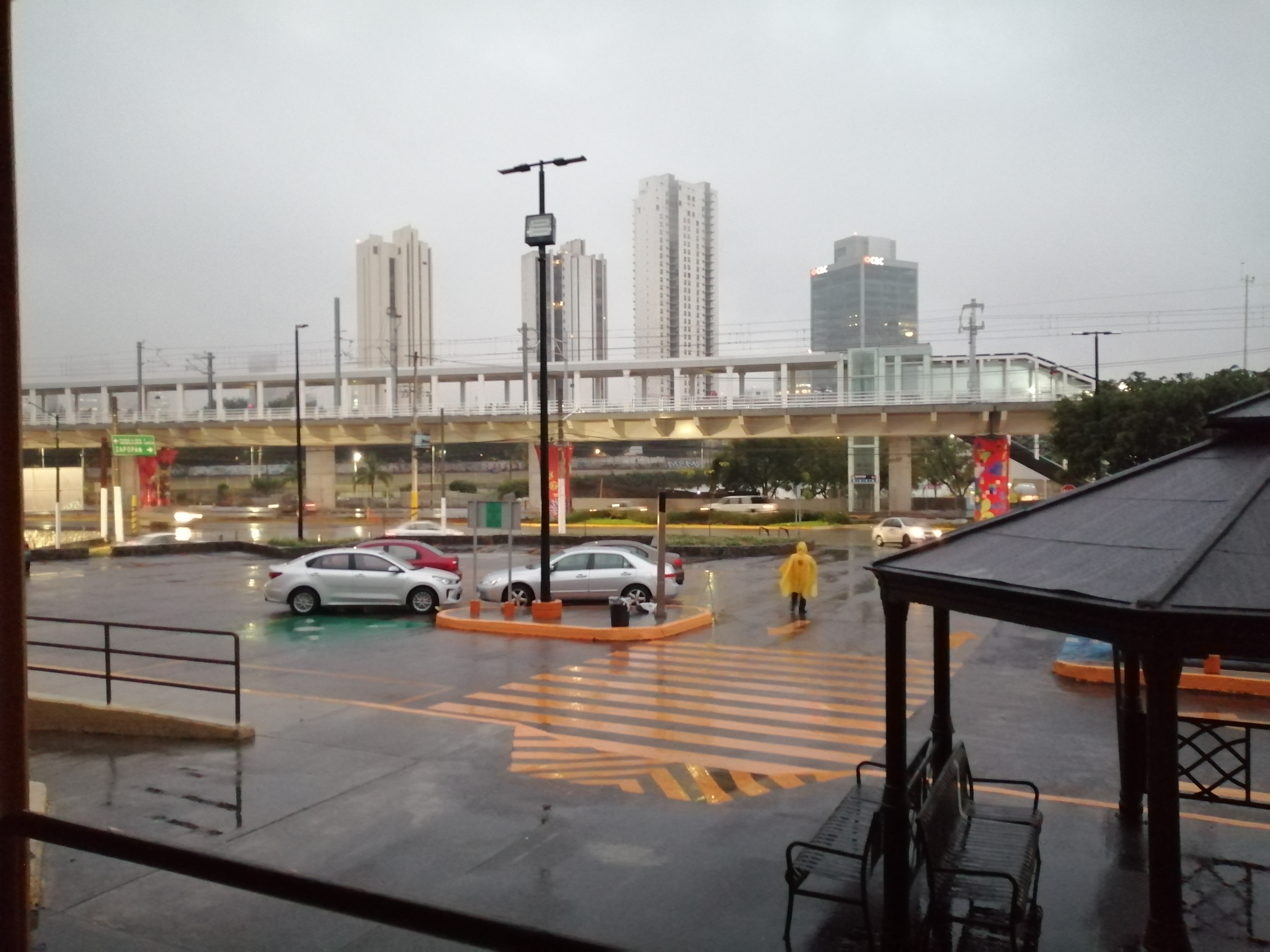 edificios